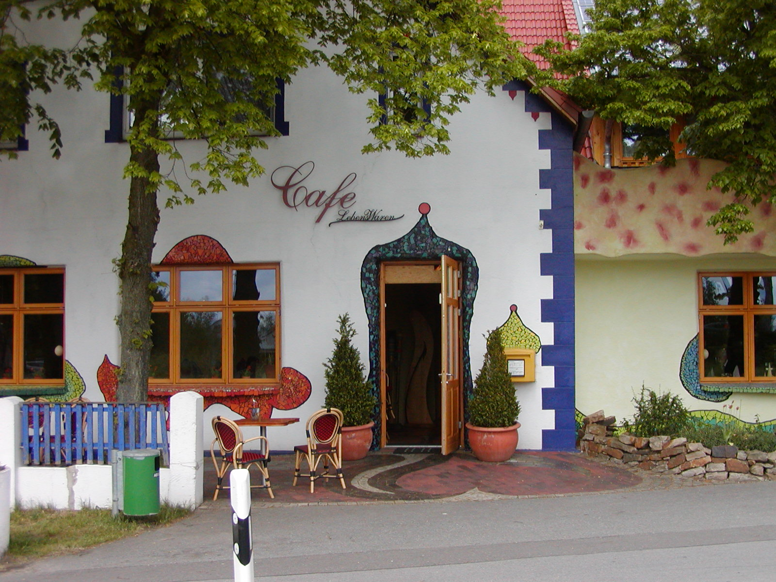 Café „Lebenswaren“ in Stemwede-Oppenwehe, Nordrhein-Westfalen, Deutschland – ( Die Gestaltung ist angelehnt an F. Hundertwasser)